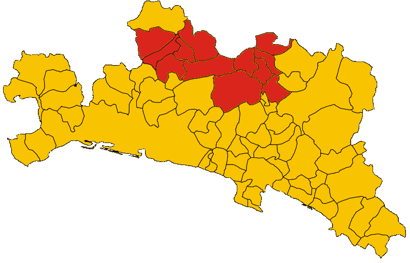 Mappa del Parco naturale regionale dell'Antola (Provincia di Genova, Liguria, Italia) con i comuni del parco